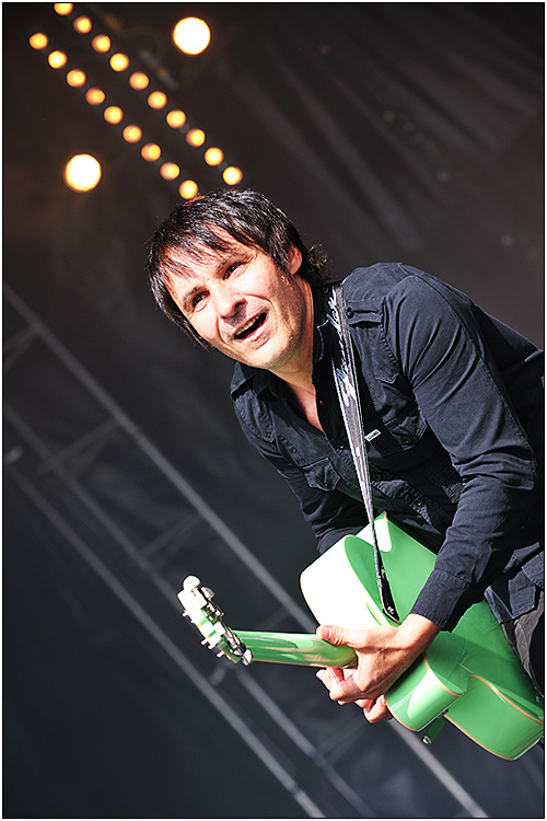 Pierre Sangra Festival du bout du monde 01-08-2009